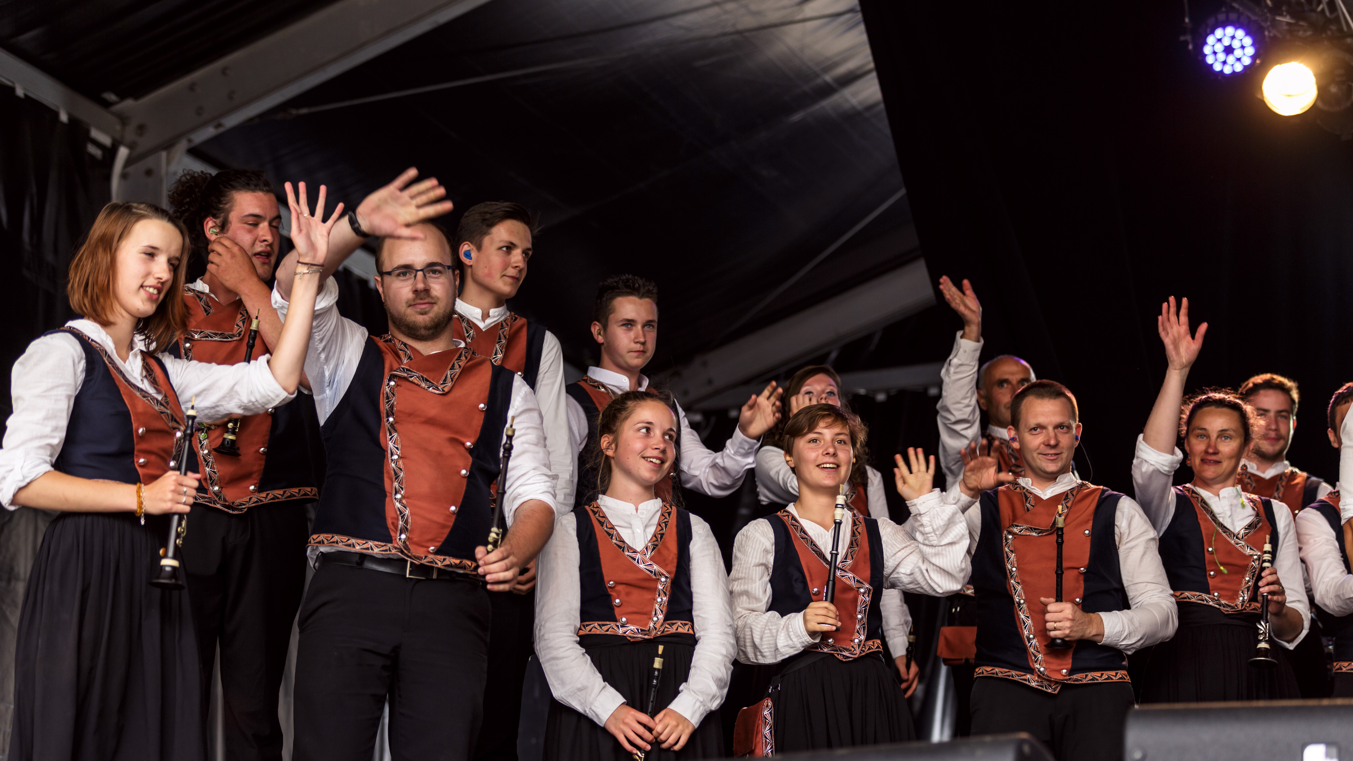 Championnat national des bagadoù de 3e catégorie au Festival de Cornouaille à Quimper le 23 juillet 2016.